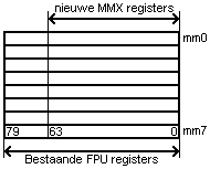 eigen materiaal, vrij van rechten